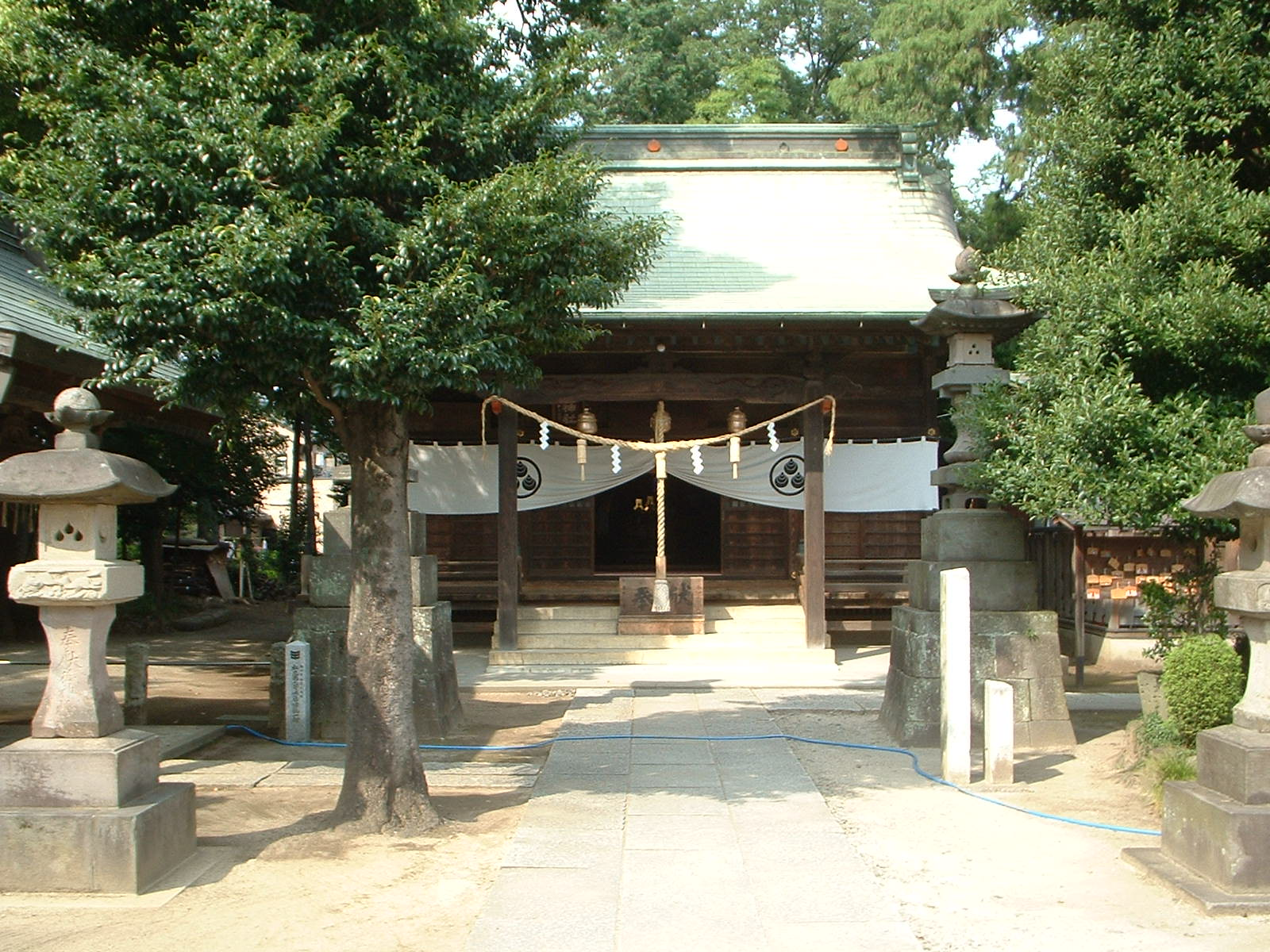 桶川稲荷神社の本殿